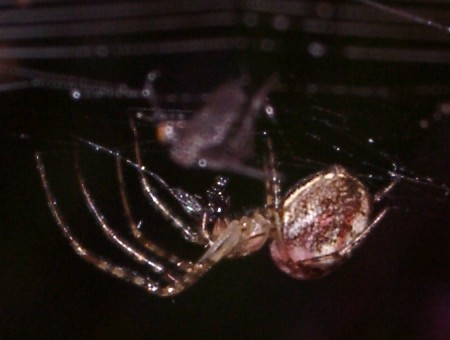 kruisspin